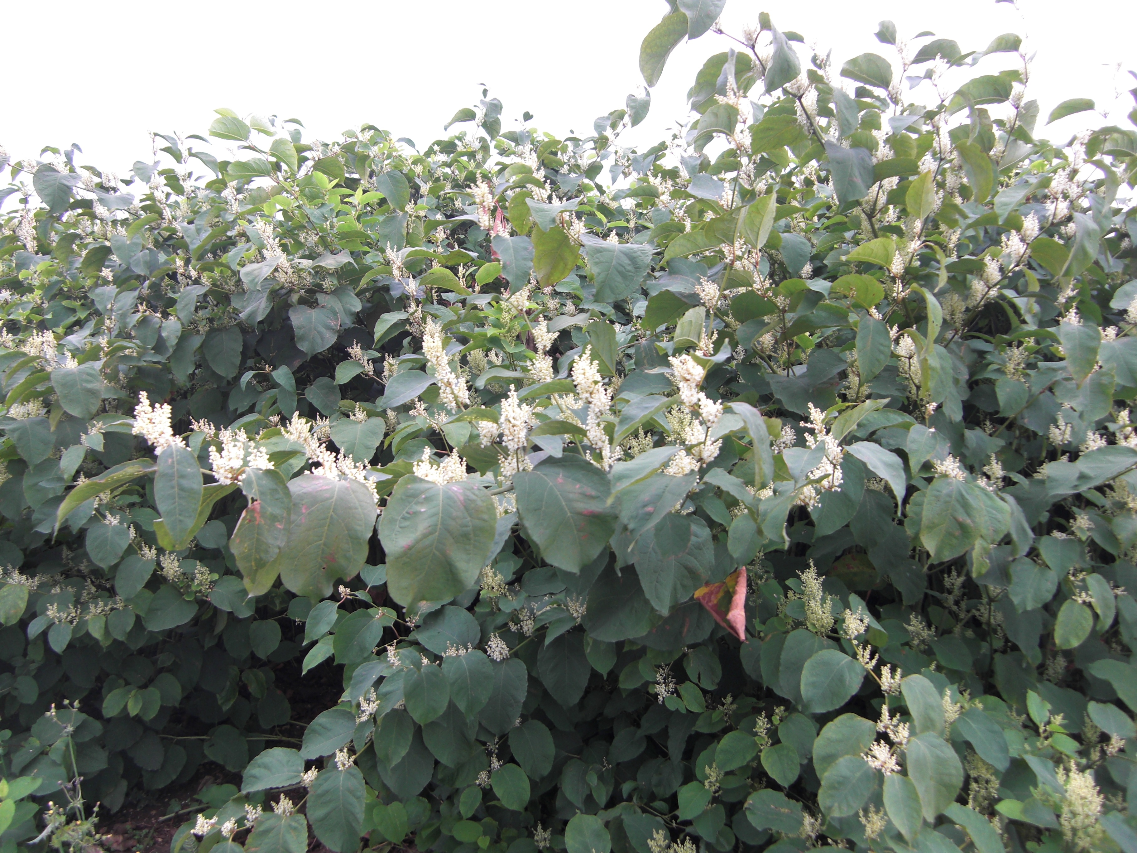 Igniscum (Fallopia sp.) in der Blütezeit